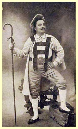 Le parolier René Marchais vers 1929